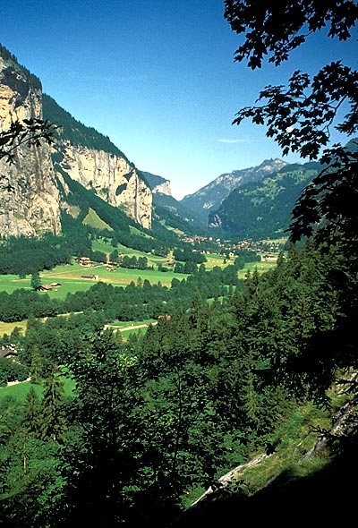 Lauterbrunnental, Schweiz (17. August 2002)